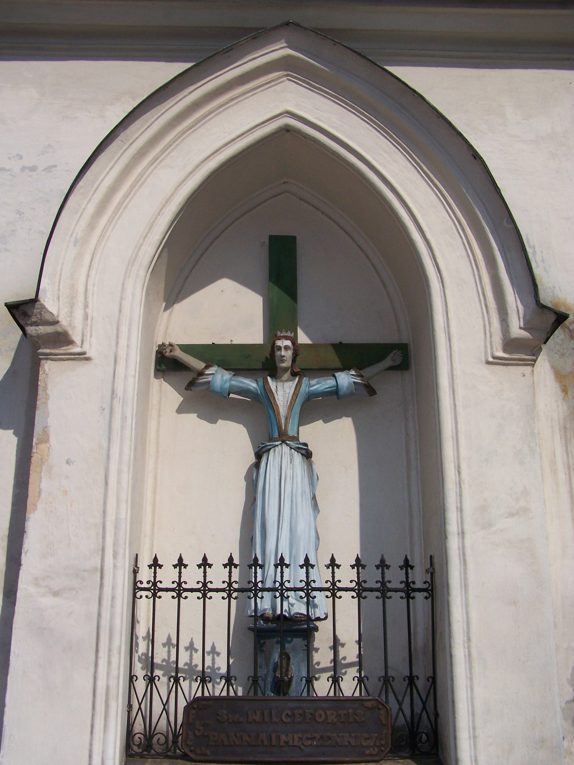 Kapliczka św. Wilcefortis w Wambierzycach.